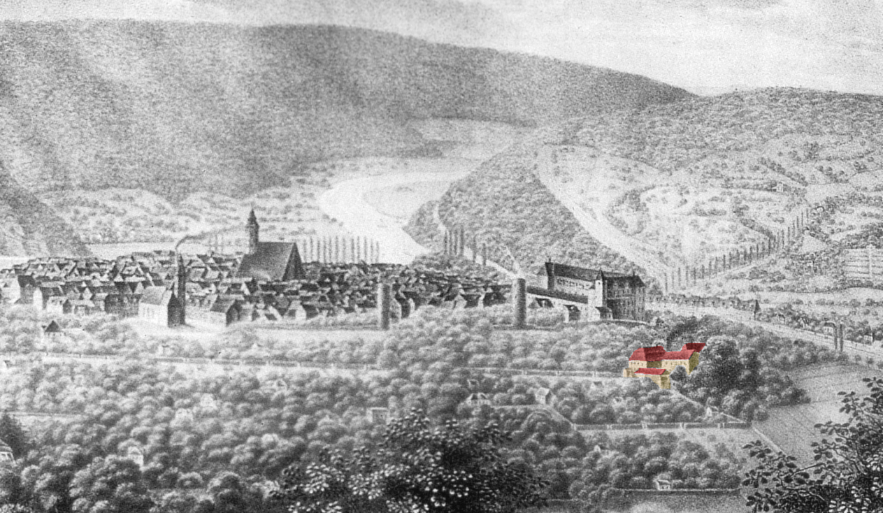 Blick vom Kattenbühl auf die Stadt Münden mit der Fayence-Manufaktur Münden, nachträglich koloriert